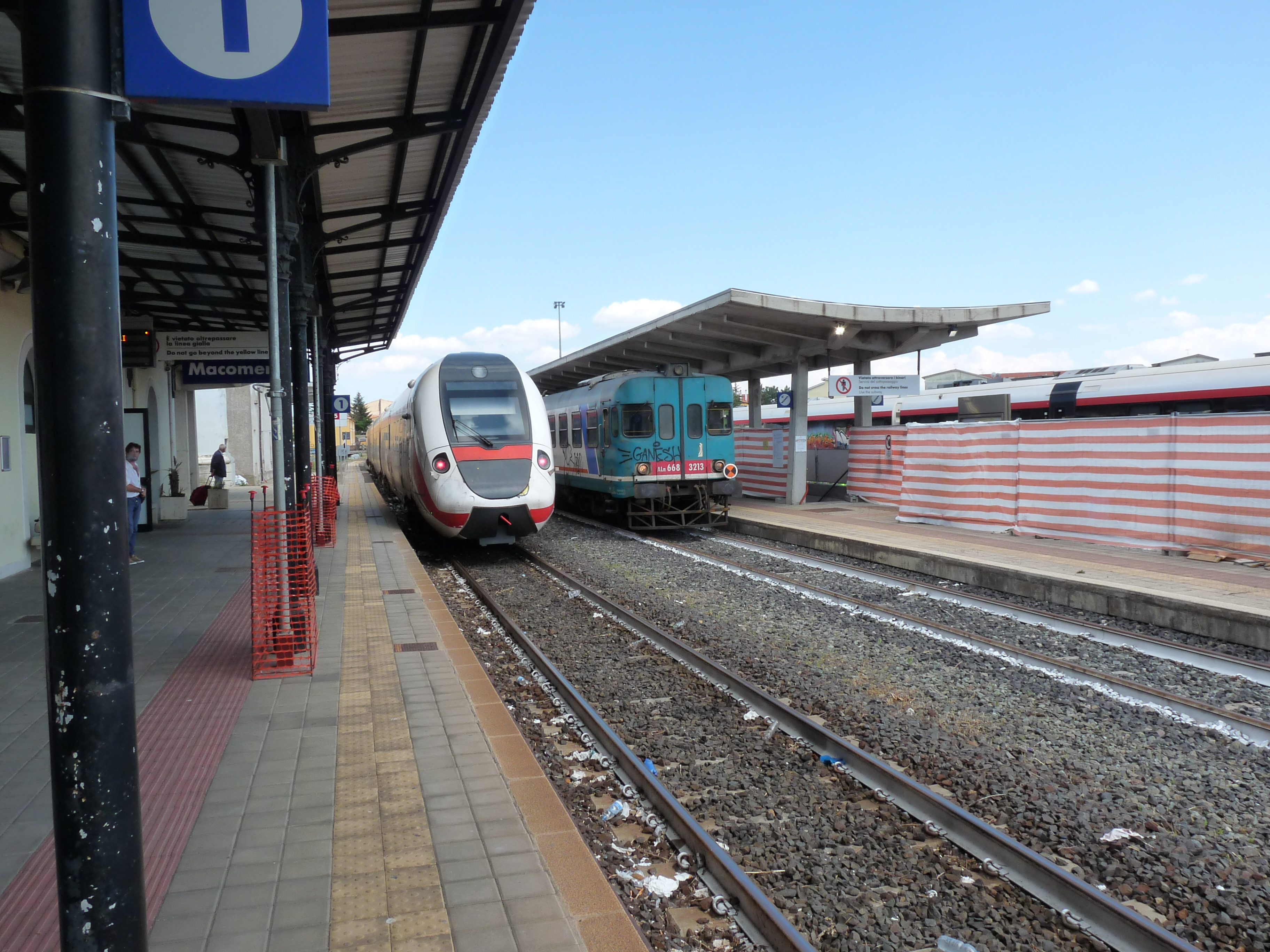 Station Macomer